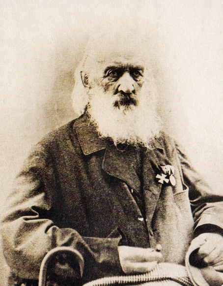 Волконский, Сергей Григорьевич